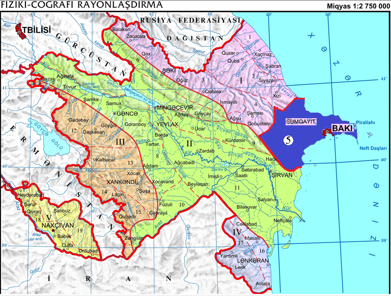 5- Qobustan-Abşeron fiziki-coğrafi rayonu